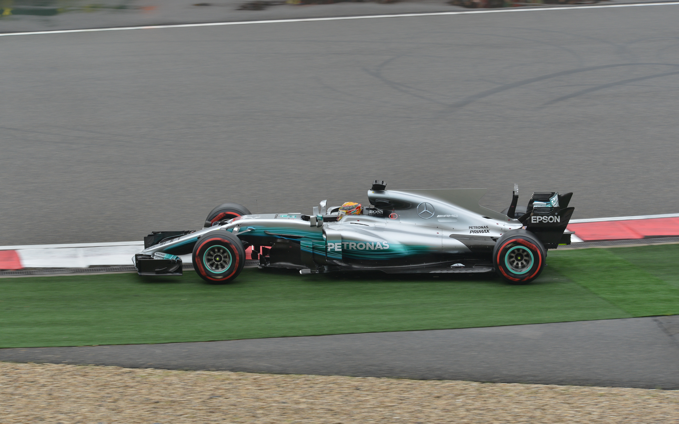 Pole to WIN.